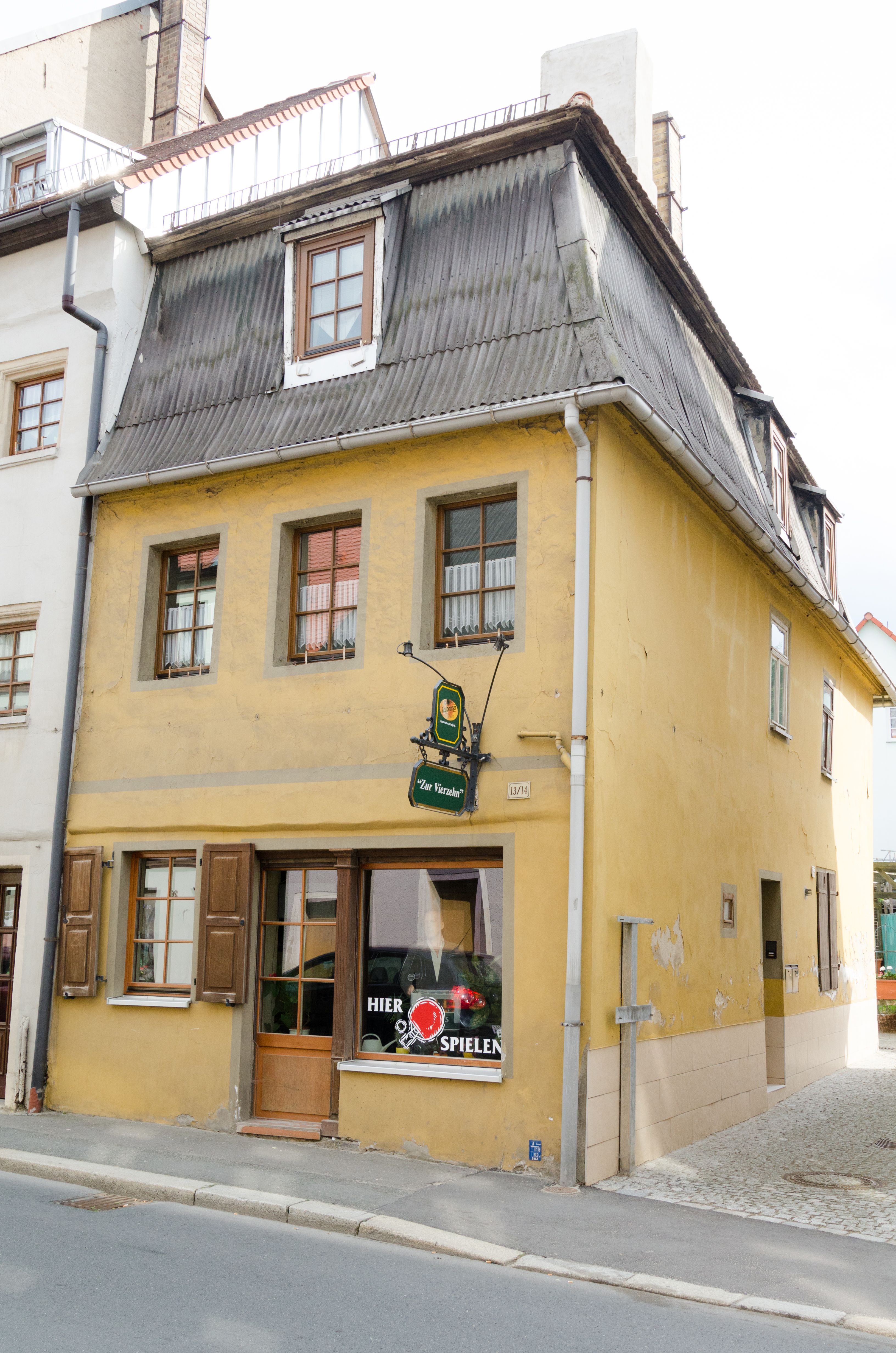 Zeitz, Kalkstraße 13